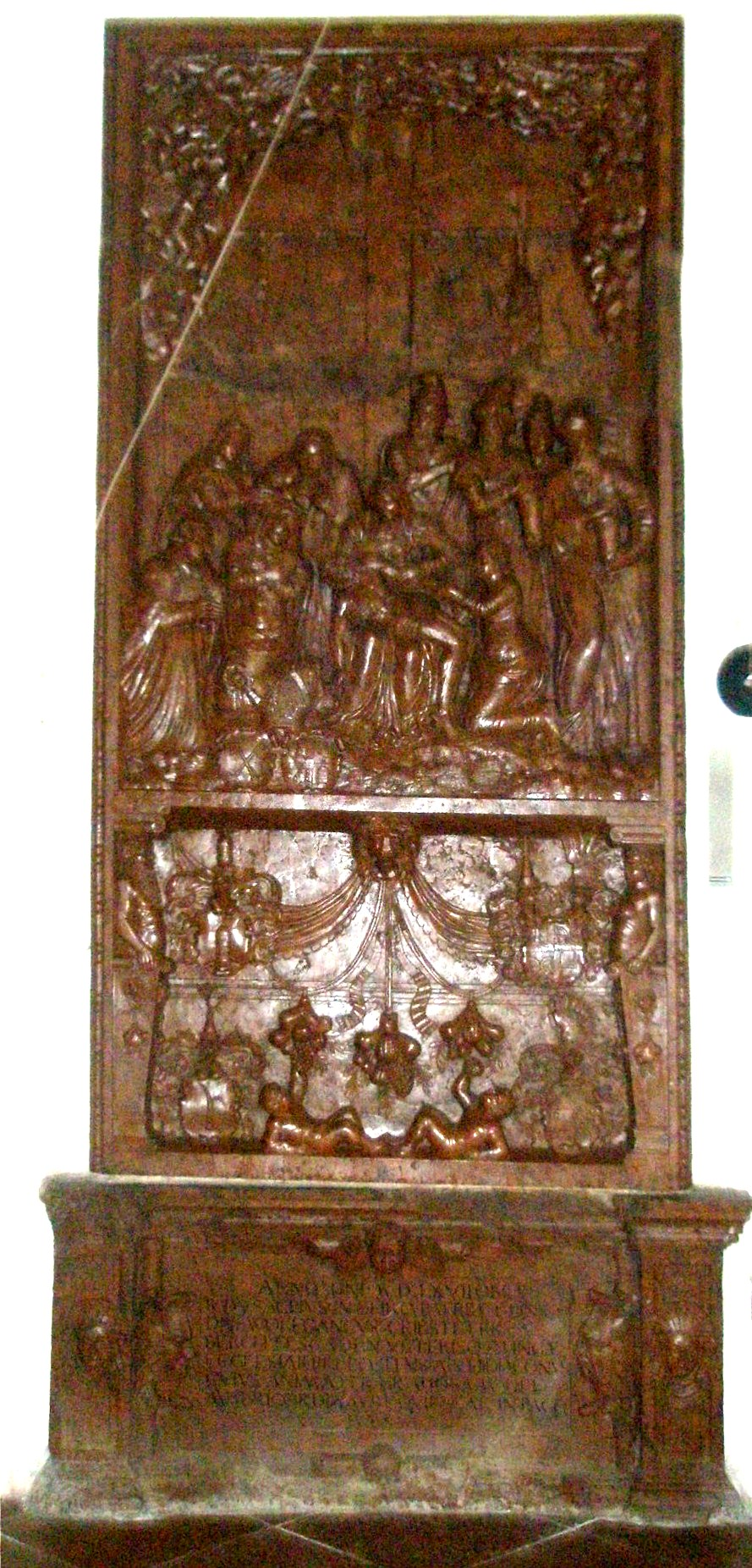 Grabdenkmal von Wolfgang II. Griesstätter zu Haslach (1490–1567) im Franziskanerkloster Berchtesgaden